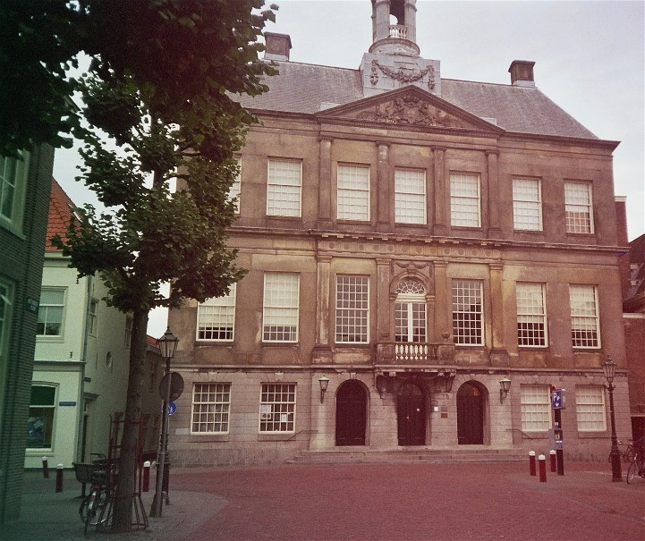 Stadhuis te Weesp. Foto gemaakt door uploader op 17 september 2004.